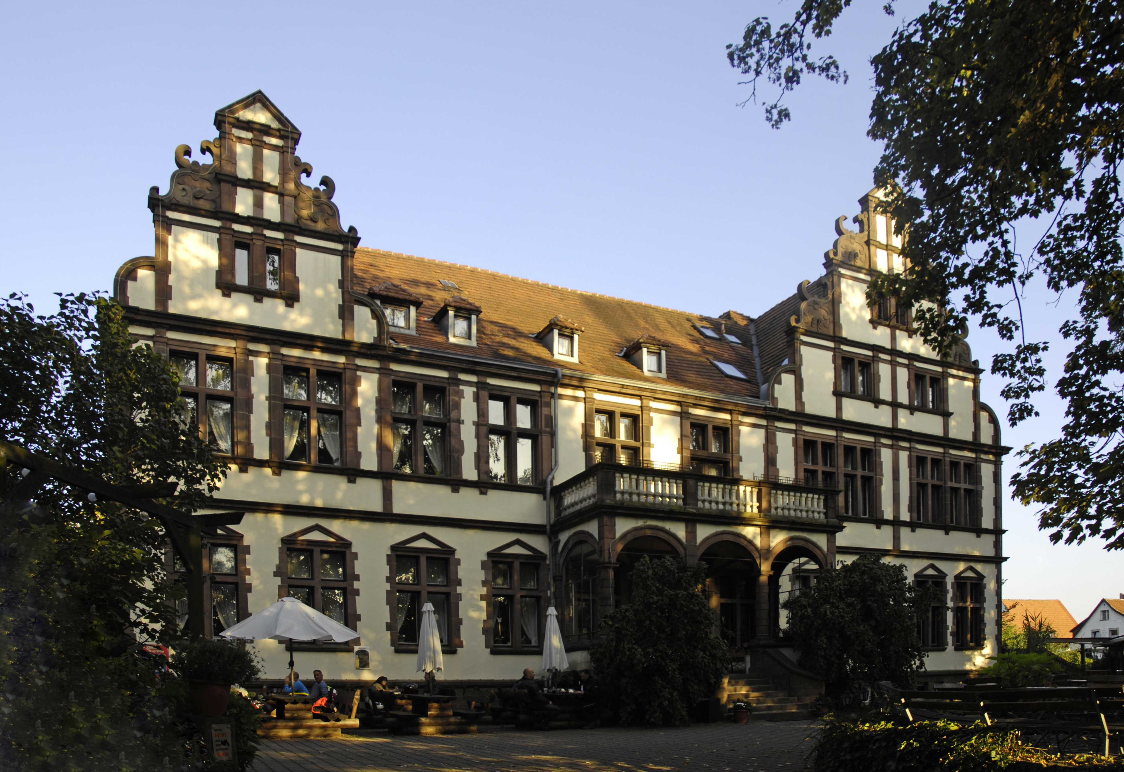 Villa Löwenherz, Lauenförde, überregionaler Treffpunkt und Hotel für Motorradfahrer